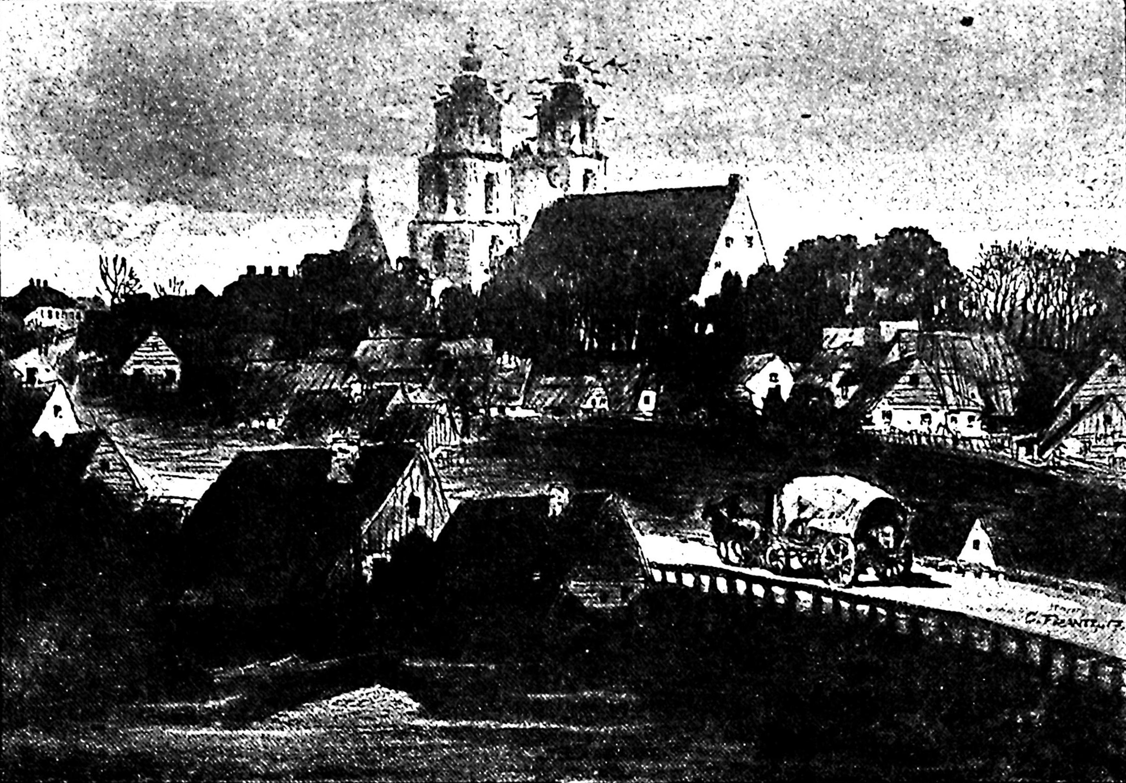 Беларуская (тарашкевіца): Езяросы (Jeziarosy)